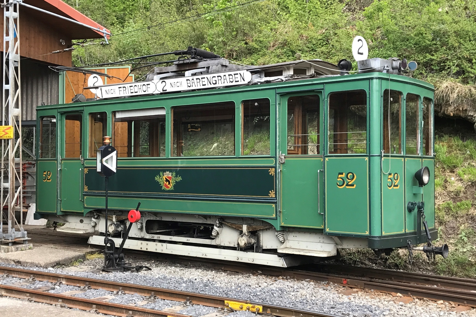 Meterspur Strassenbahn Motorwagen Ce 2/2 52 der ehemaligen Städtische Strassenbahn Bern (SSB), heute Städtischen Verkehrsbetriebe Bern (SVB), Geschäftsbezeichnung Bernmobil, im ursprünglichen olivgrünen Anstrich auf dem Museums-Areal der Museumsbahn Blonay–Chamby (BC) in Chamby-Musée (Chaulin) im April 2017.